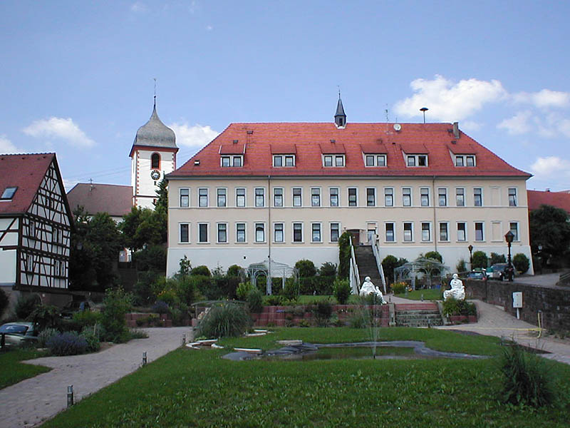 Schloss Binau (Odenwald), heute genutzt als Altersheim, daneben Kirche von 1783